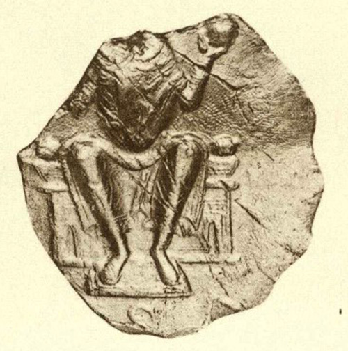 Hermann von Salm